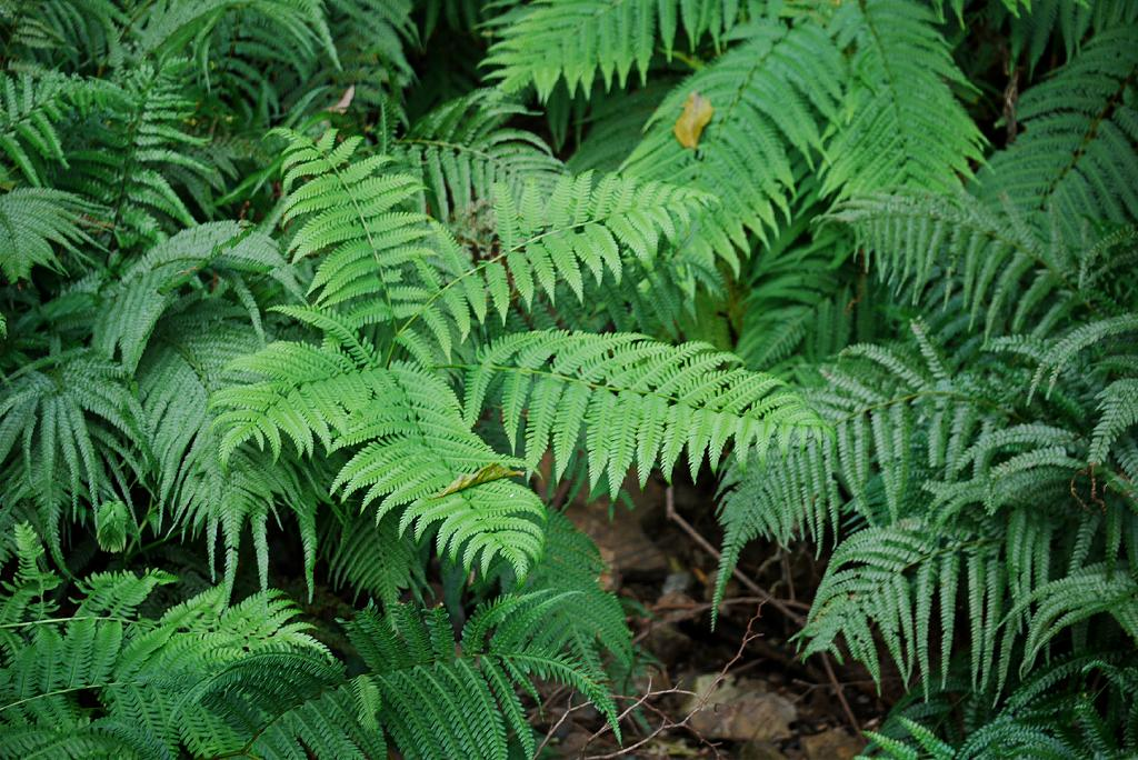 Pteris wallichiana ナチシダ 2012年11月 和歌山県みなべ町：minabe town.Wakayama Pref.Japan